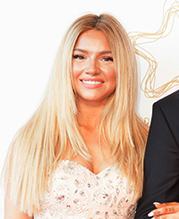 Shirin David und Jan Rode, Webvideopreis 2015